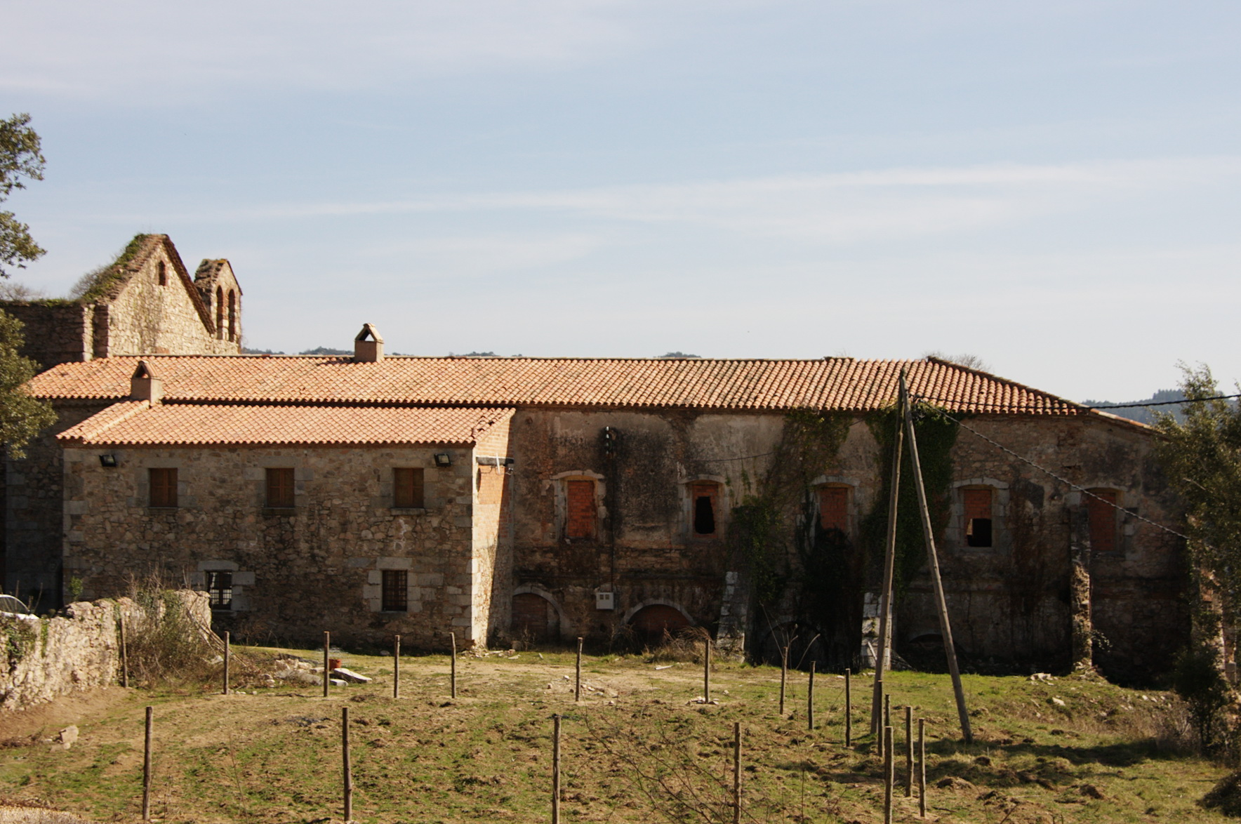 Sant Salvi de Cladells(Santa Coloma de Farners-Catalunya). Original de 1282, ampliat pels franciscans al 1735